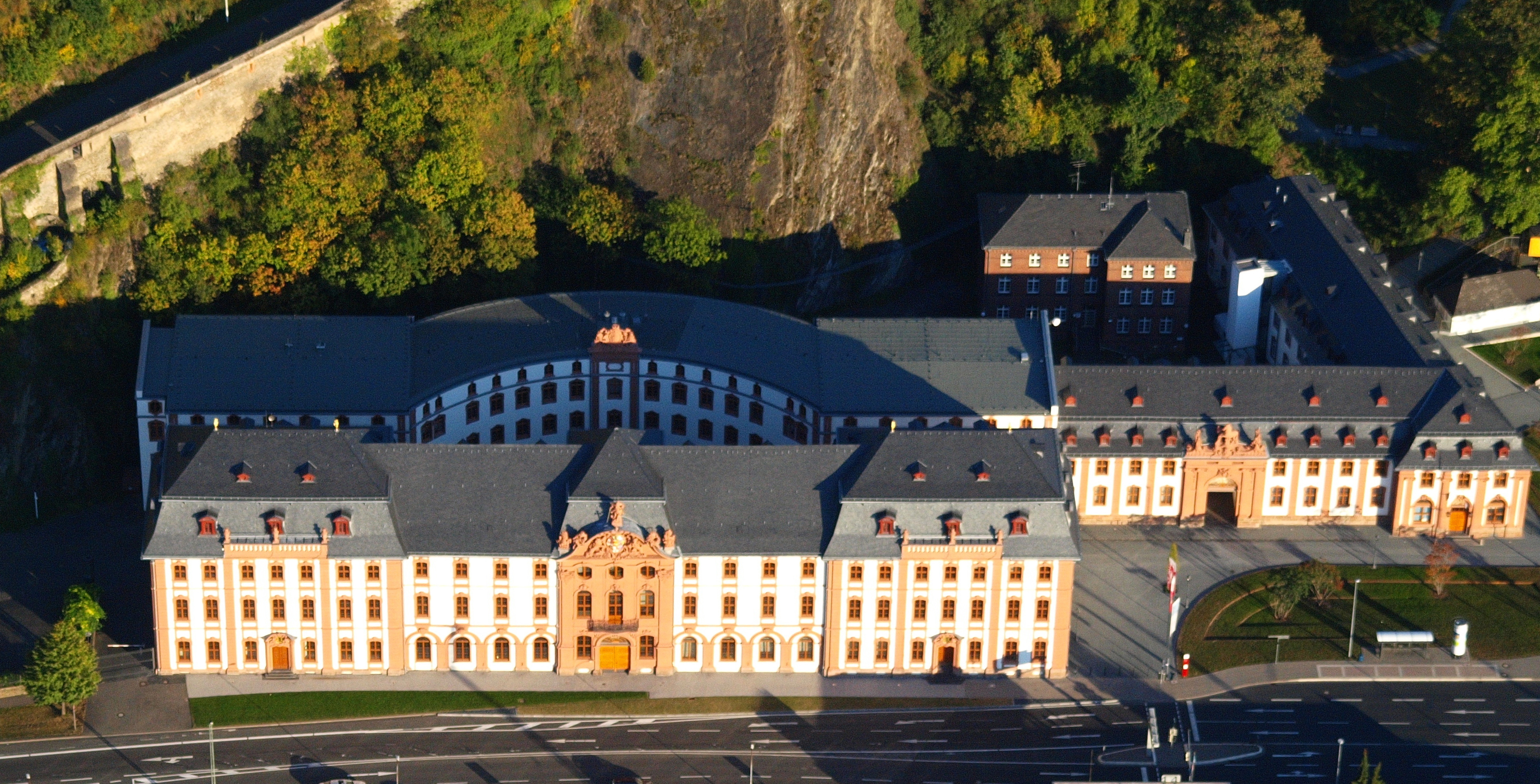 Dikasterialbau des ehemaligen, untergegangenen Schlosses Philippsburg in Ehrenbreitstein, Koblenz, mit dem hinter dem Dikasterialgebäude gelegene Krummstall als schmuckloser, scheinbar halbrunder dreigeschossiger Bau mit 41 Achsenden, dem benachbarten Marstall sowie der Pagerie (für die Pagen): Luftaufnahme